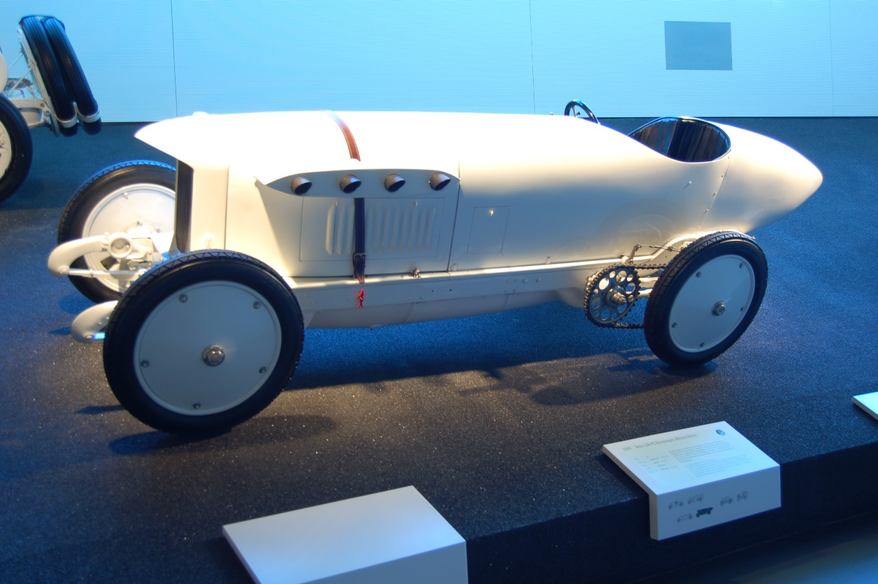 Mercedes-Benz "Blitzen Benz" racing car